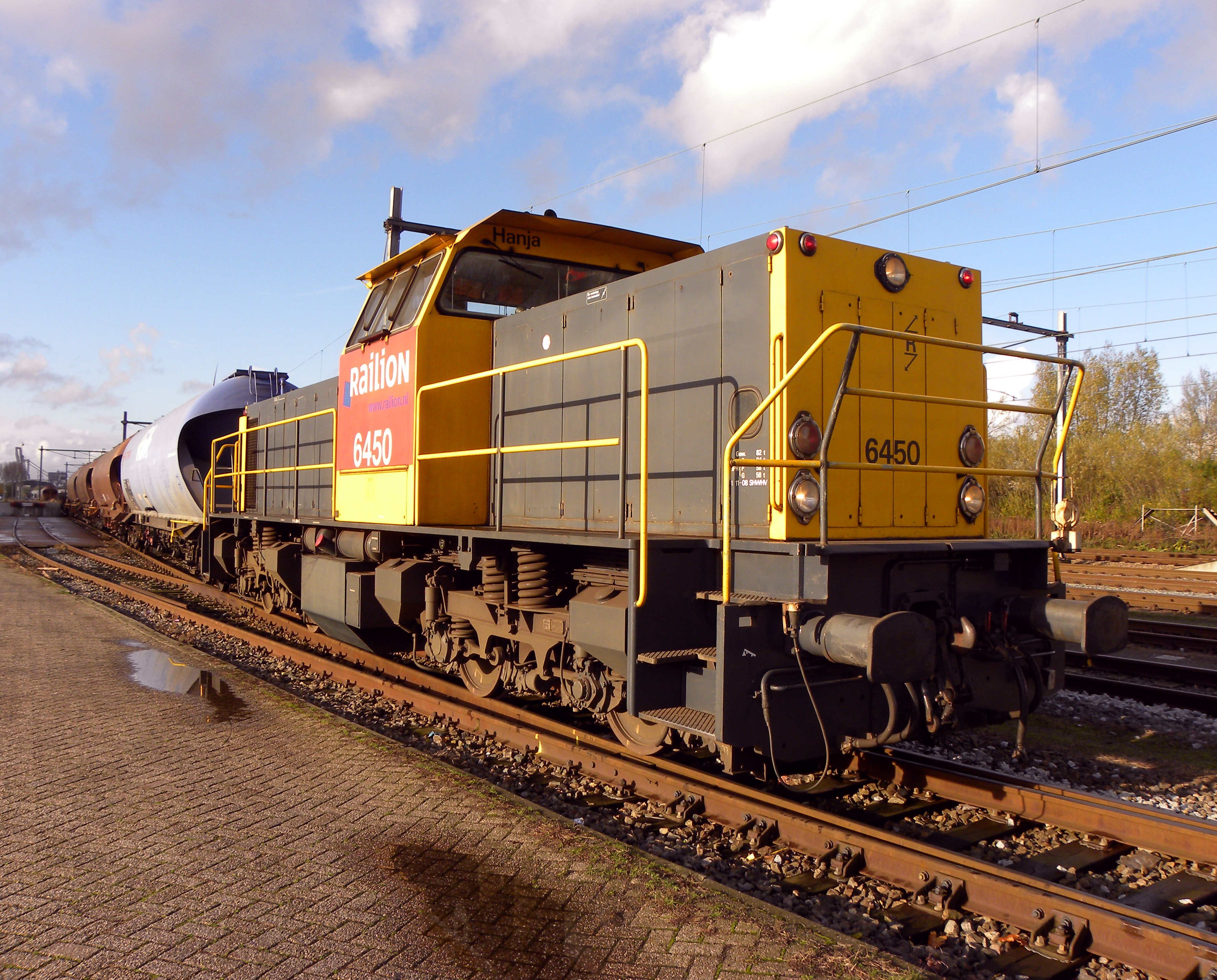 Railion 6450